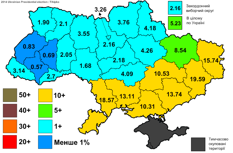 Електоральна підтримка Тігіпка Сергія Леонідовича на виборах Президента України 2014.